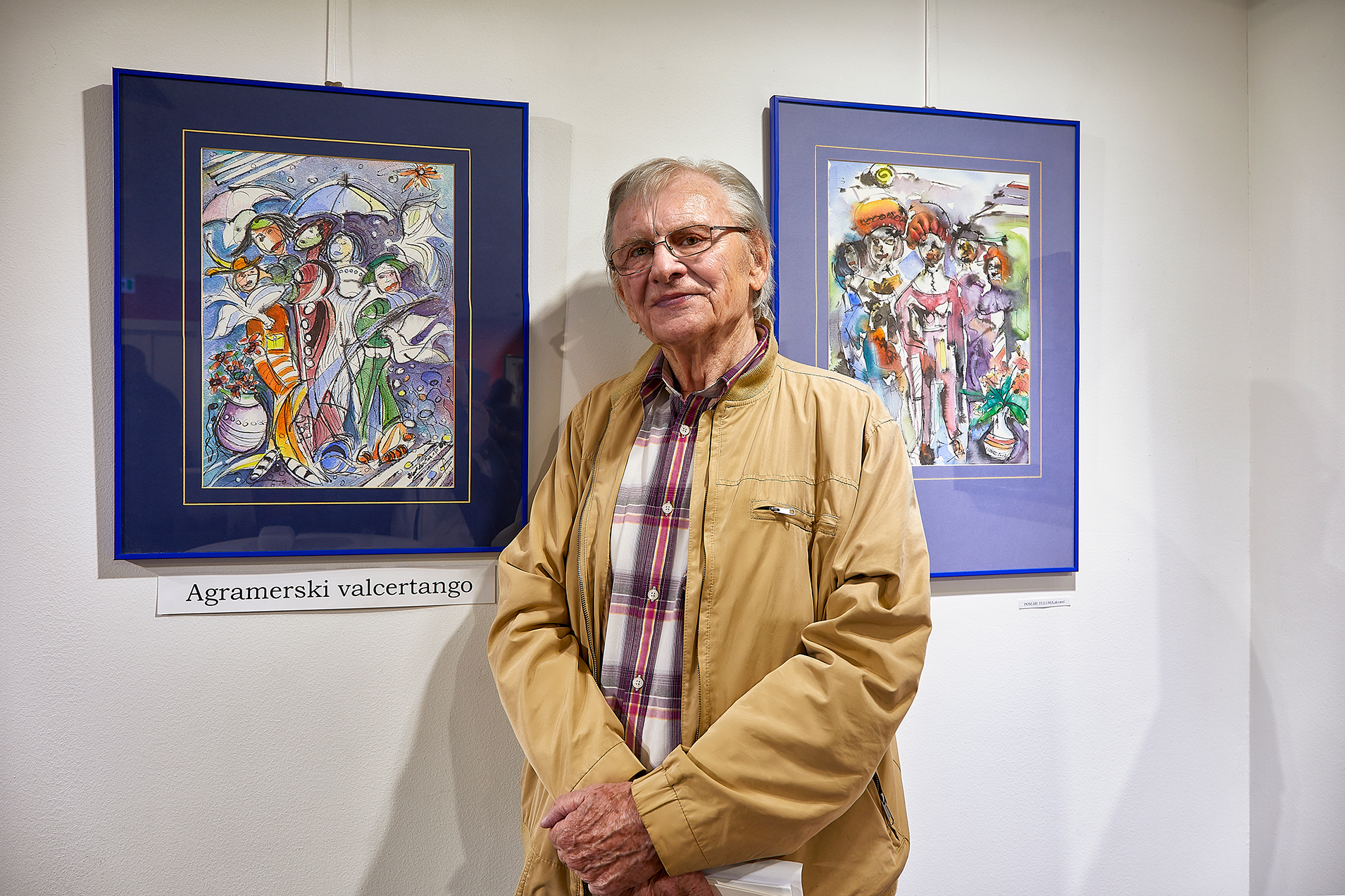 Zlatko Crnec na otvorenju svoje izložbe u Galeriji Kraluš POU Sv. Ivan Zelina, 24. 5. 2019.